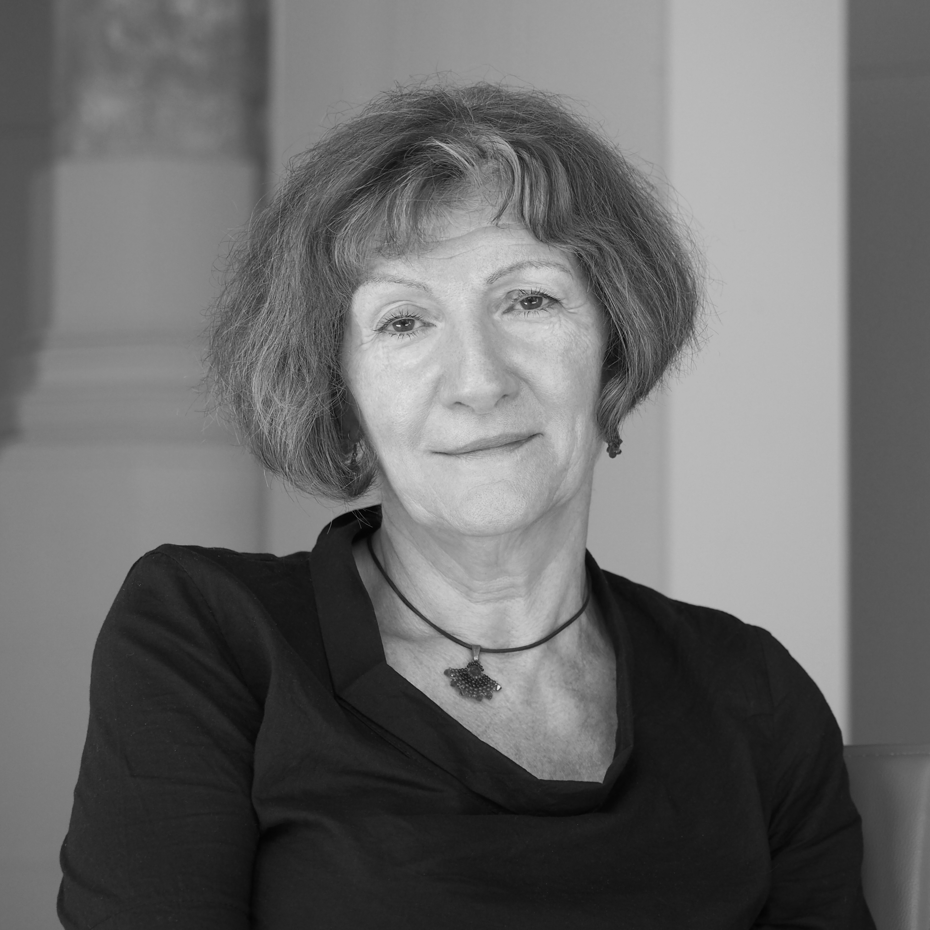 Láng Judit, belsőépítész, a MABE elnöke, a "20 éves az Év Belsőépítésze Díj - Iparművészet a belsőépítészetben" c. kiállítások kurátora a Pesti Vigadó /V. ker Vigadó tér 1./ földszinti kiállítóterében 2019. augusztus 22-én.